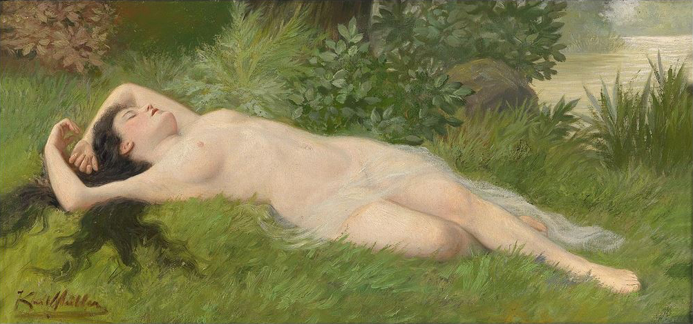 Weibliche Akt in Landschaft 23,5 x 48,5 cm